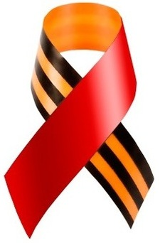 Красная и Георгиевская лента